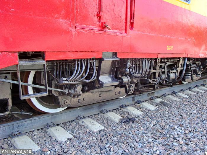 Тележка дизель-поезда Д1-538